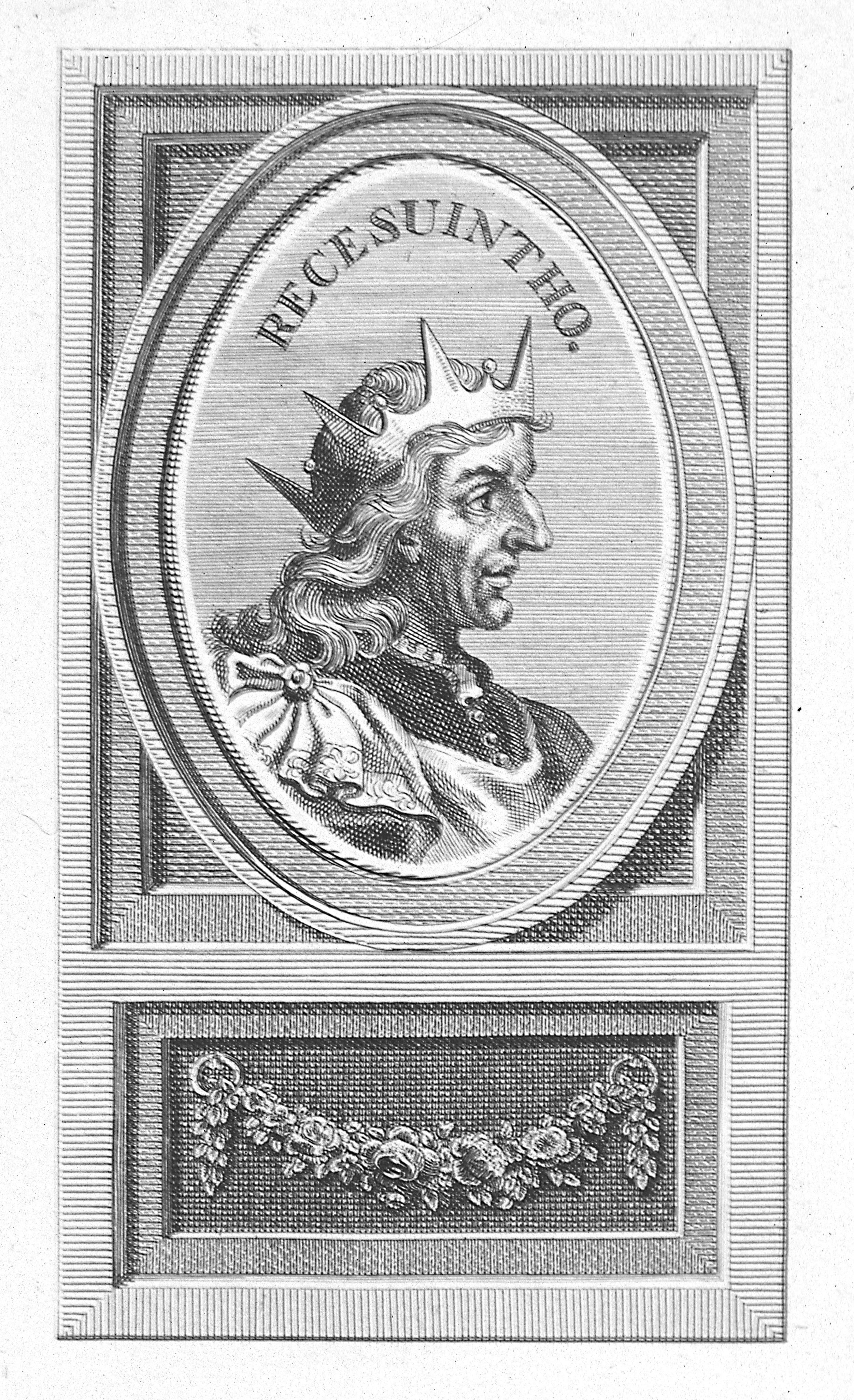 Recesvinto o Recesuintho (? - 672) fue un rey de los visigodos (653 - 672)